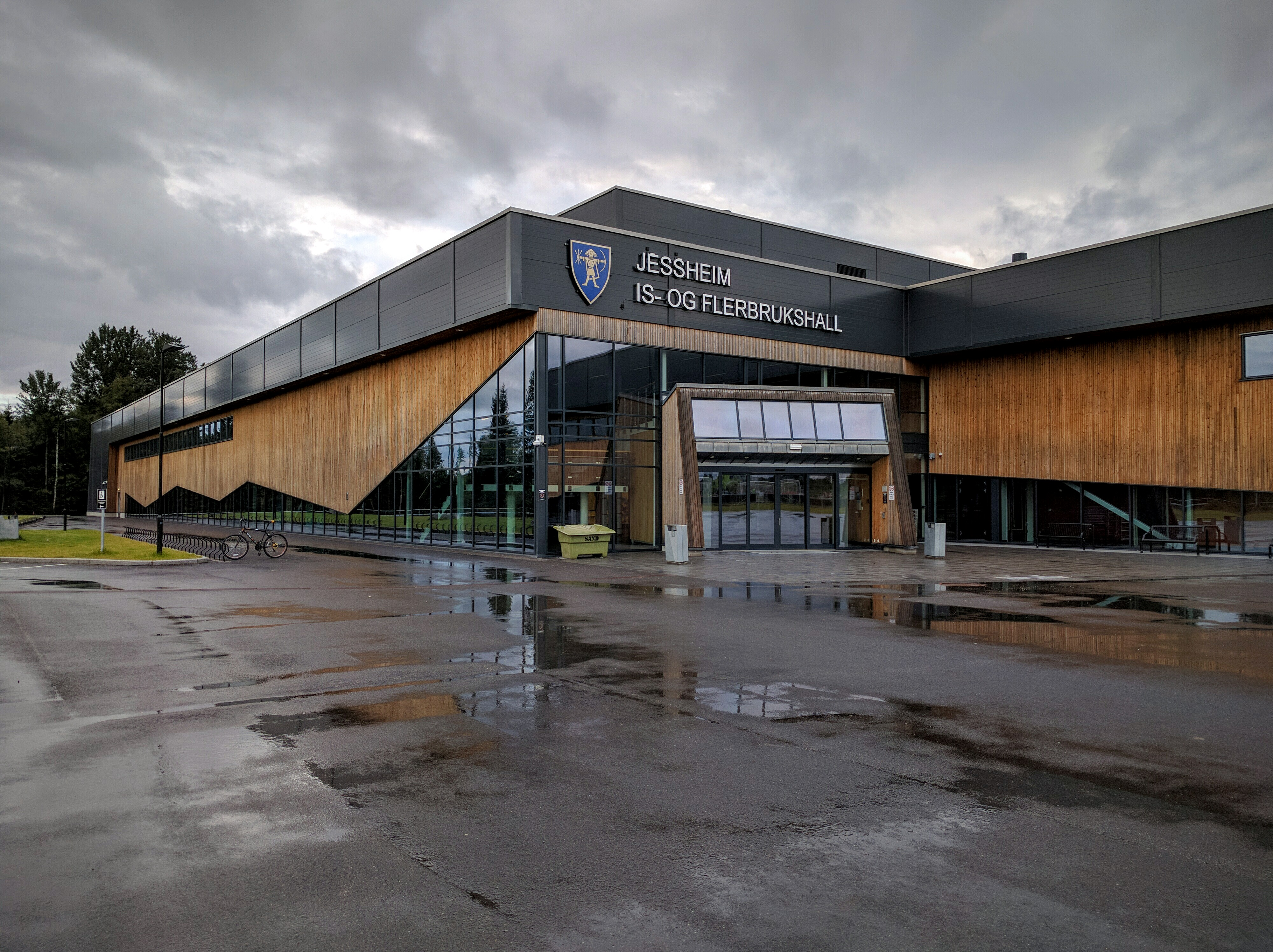 Jessheim is- og flerbrukshall